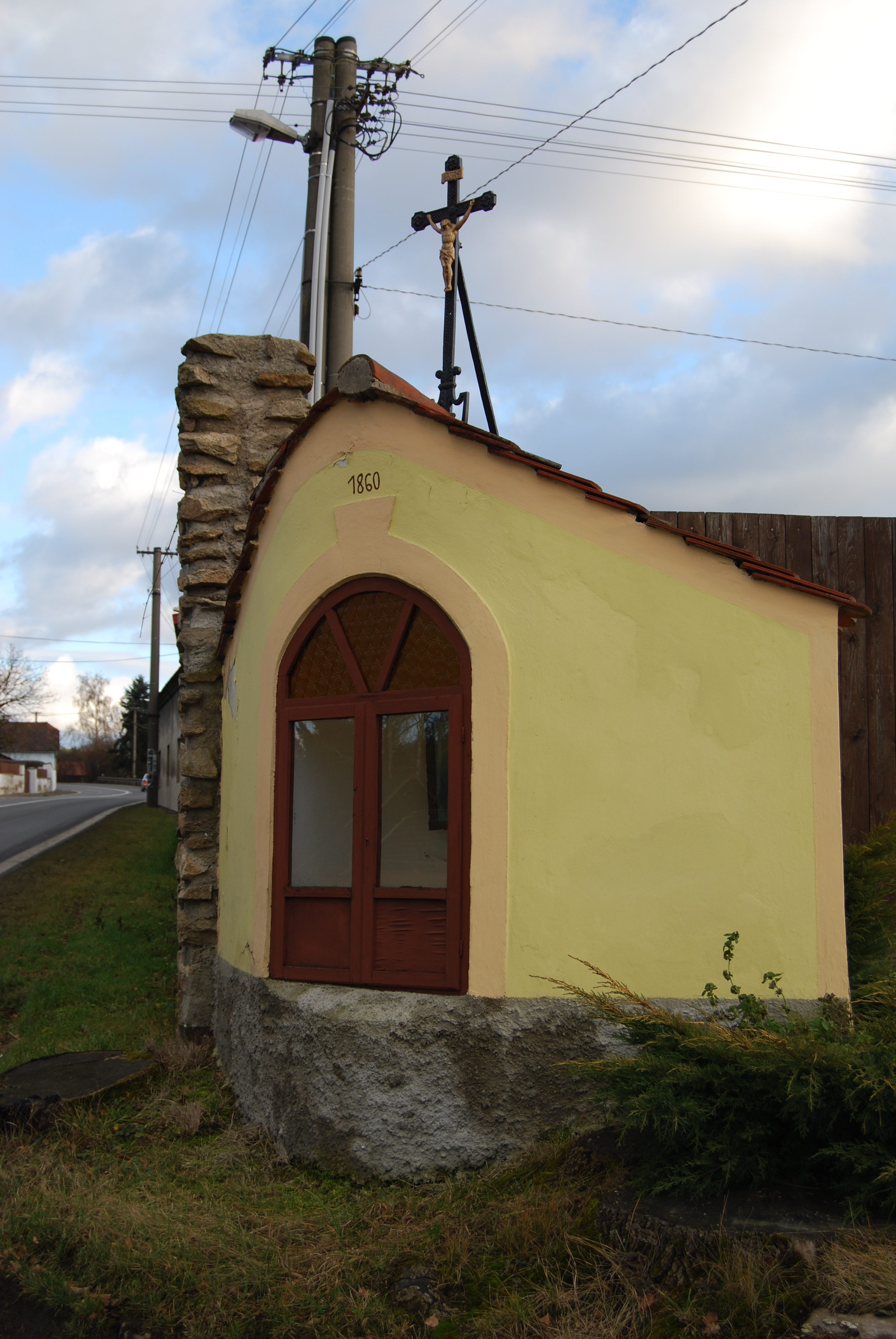 Výklenková kaple sv. Floriána v obci z roku 1860. Podolí I. Okres Písek. Česká republika.